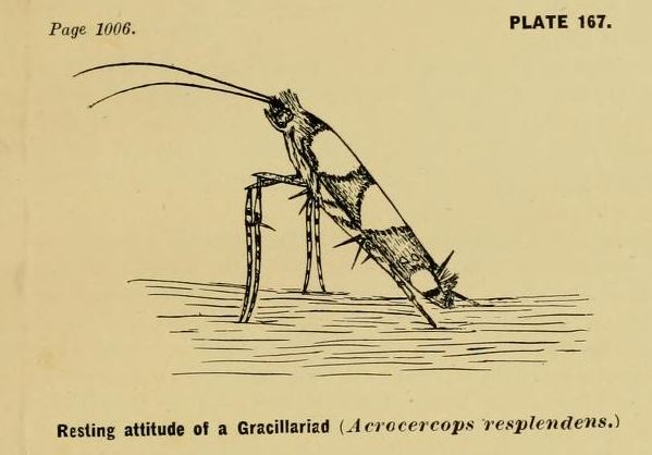 Monocercops resplendens